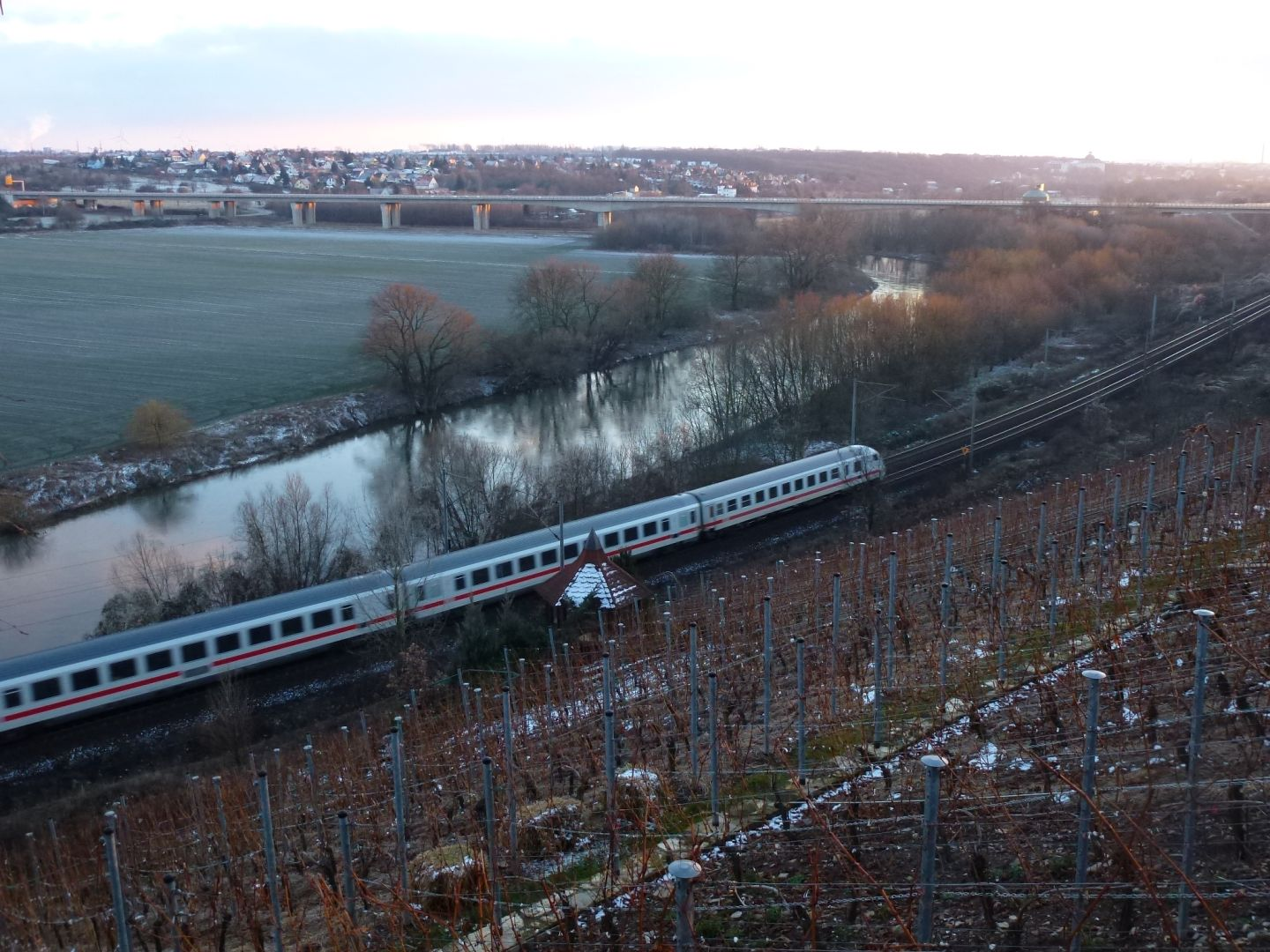 Blick von Burgwerben auf die Saale, die Bahnlinie, die B91-Brücke und Weißenfels